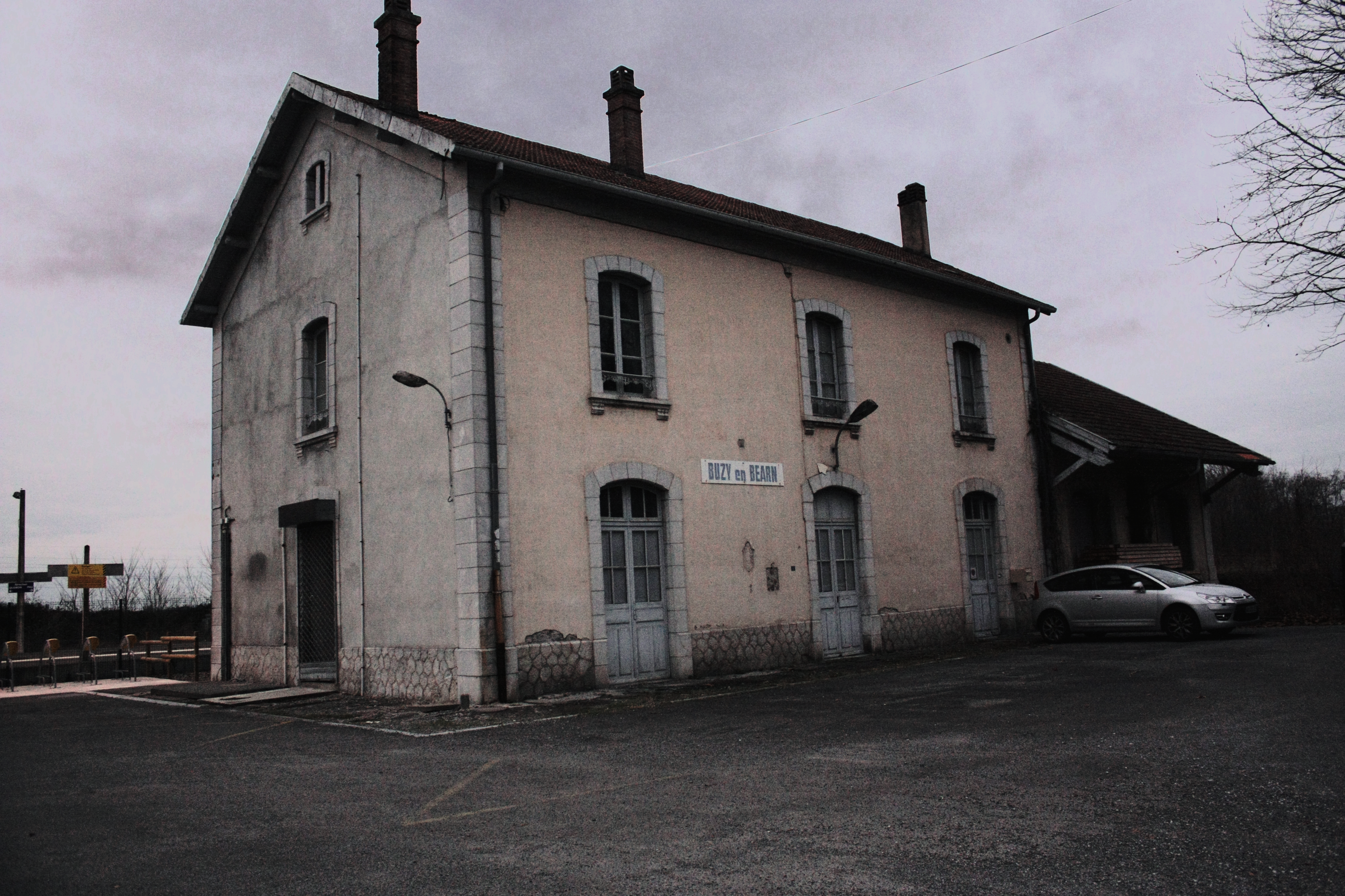 Vue du bâtiment voyageurs de la gare de Buzy-en-Béarn (Pyrénées-Atlantiques, France), anciennement bifurcation entre la ligne de Canfranc et celle de Laruns.